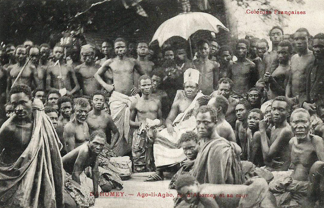 Agoli-Agbo, roi d'Abomey et sa cour Colonies françaises. Dahomey Pas d'indication d'auteur, d'éditeur ou de date